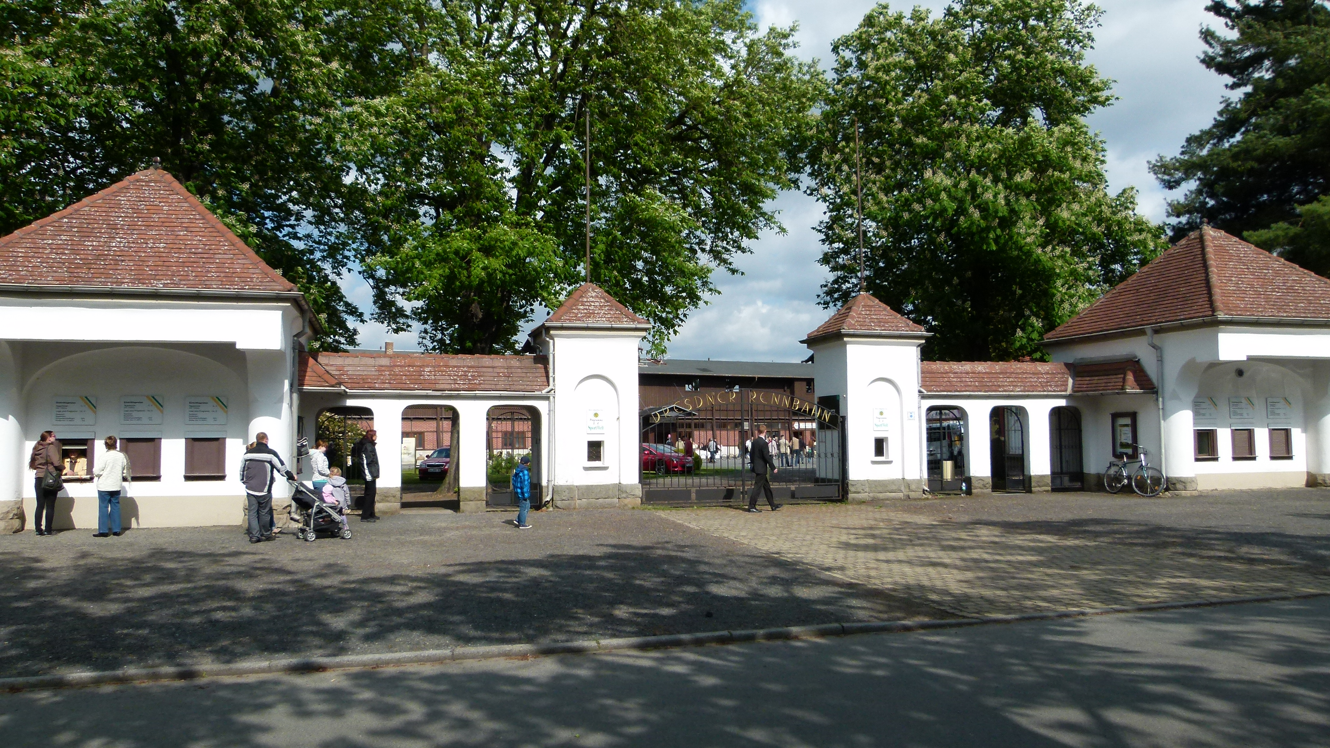 Seidnitzer Pferderennbahn, Seidnitz, Dresden